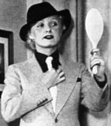 Bársony Rózsi magyar színésznő. Eisemann Mihály: Én és a kisöcsém. (Fővárosi Operettszínház, 1934)